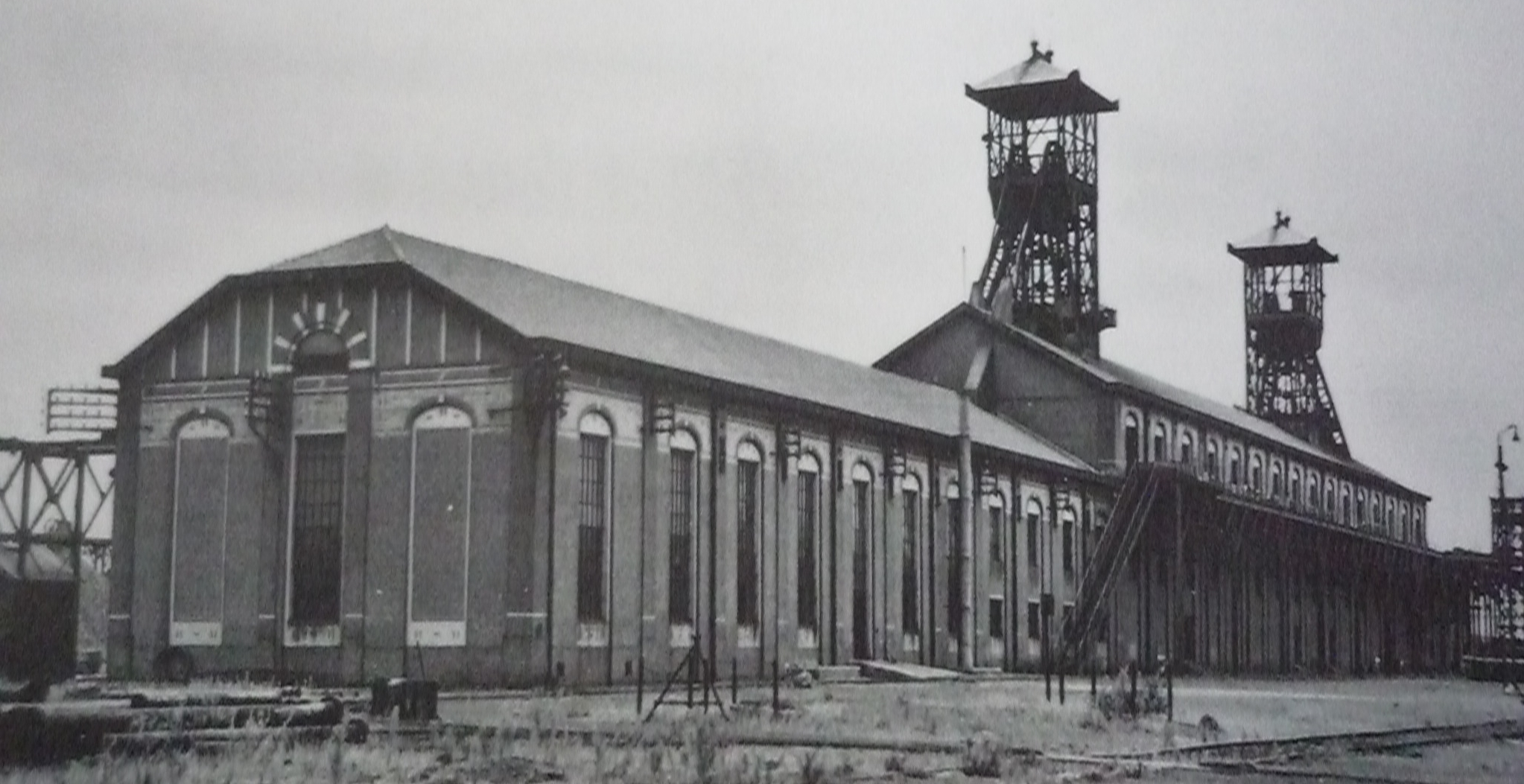 La Fosse Barrois de la Compagnie des mines d'Aniche était un charbonnage constitué de deux puits situé à Pecquencourt, Nord, Nord-Pas-de-Calais, France.